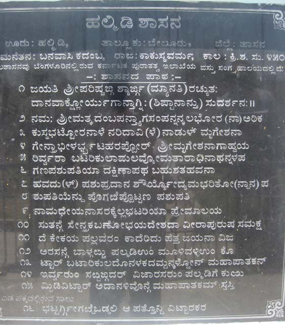 ಕನ್ನಡ: ಶಾಸನದ ಹೊಸಗನ್ನಡ ಬರೆಹ